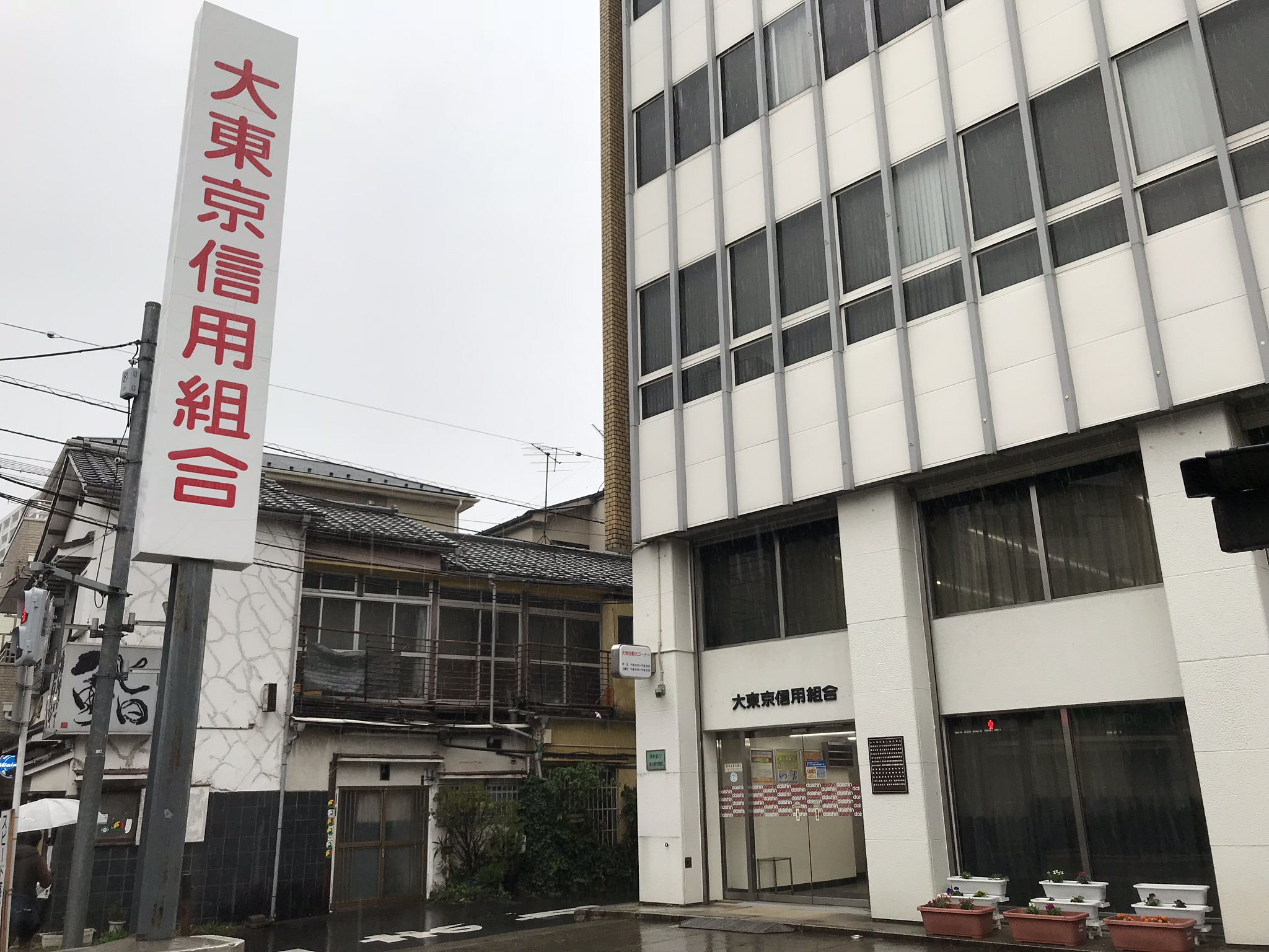 大東京信用組合常盤台支店(2018年11月撮影)